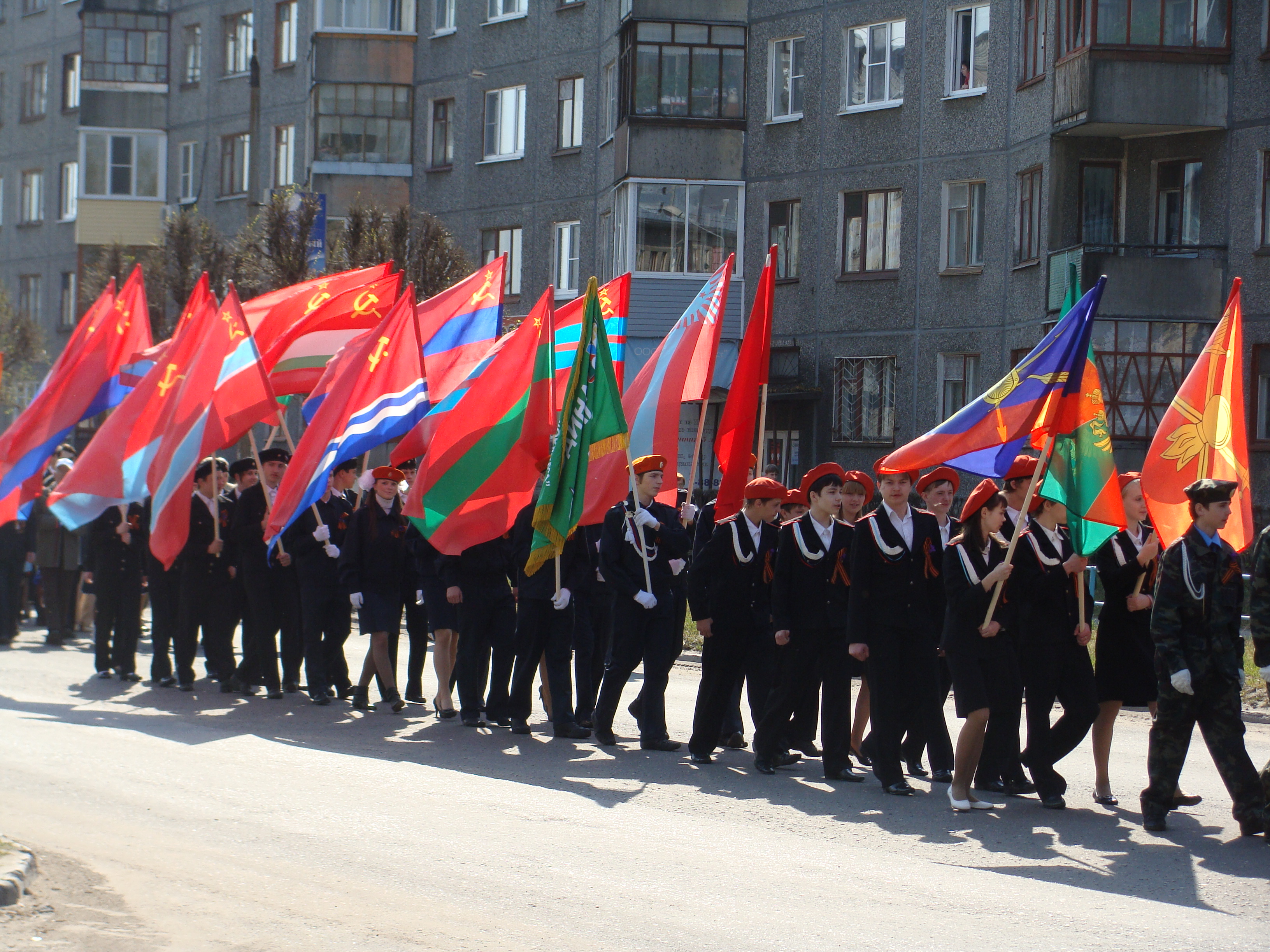 Празднование Дня Победы в Коряжме, 2010 год